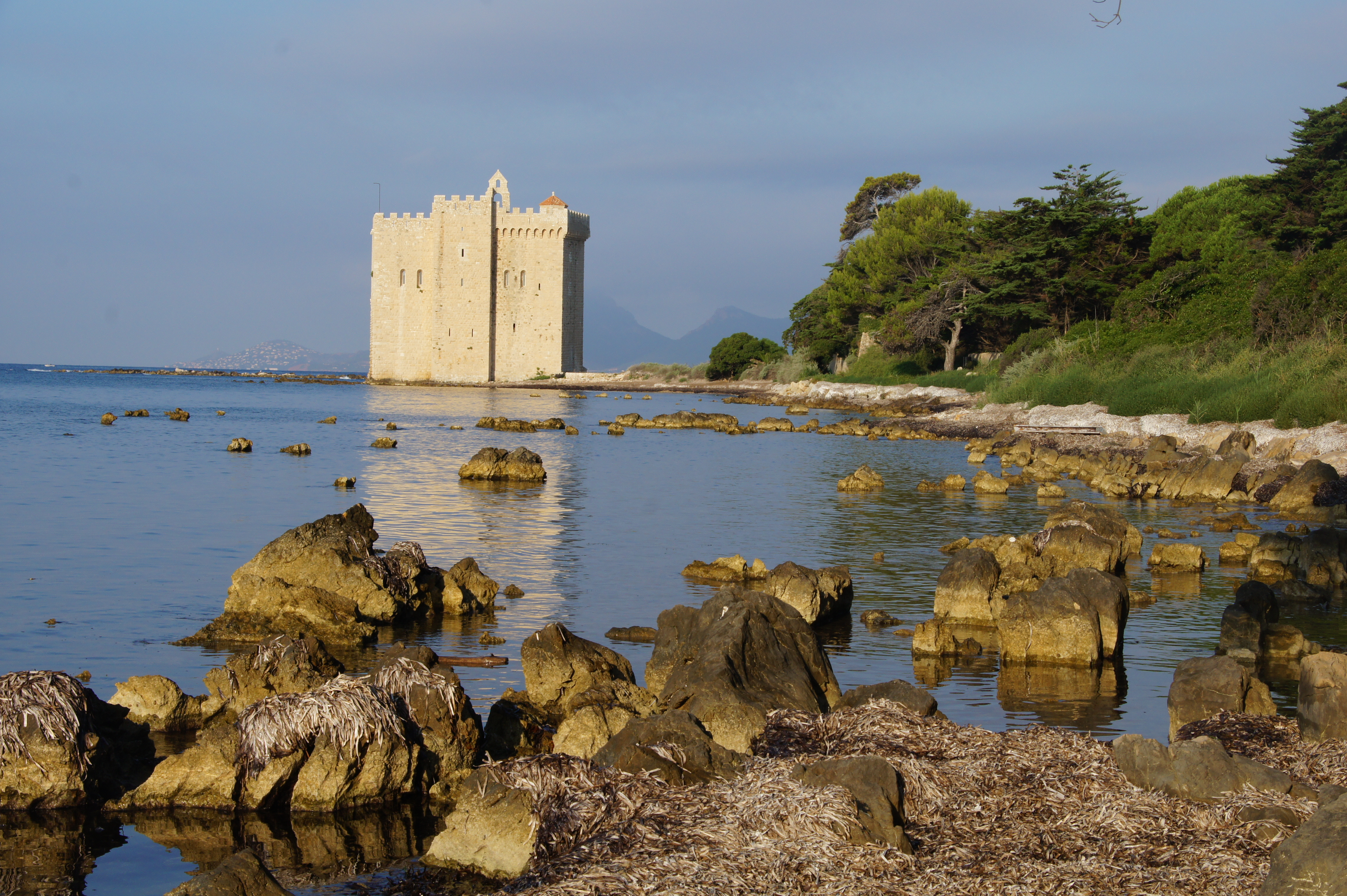 Insel Saint-Honorat frühmorgens